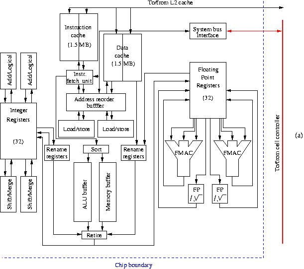 Diagrama de blocs d'un processador RISC